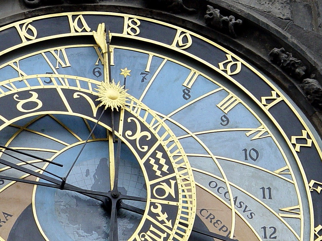 Prague - Astronomical Cock Detail Praha - Staroměstský orloj, detail Slunce, zlatá ruka, hvězdička